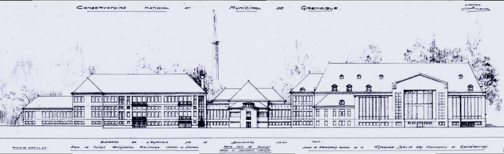 Projet vers 1953-1954 de construction d'un nouveau Conservatoire de musique à Grenoble le long du boulevard Jean Pain, dans le parc Paul Mistral. Projet jamais réalisé, un bâtiment se fera en 1969 dans le sud de la ville.